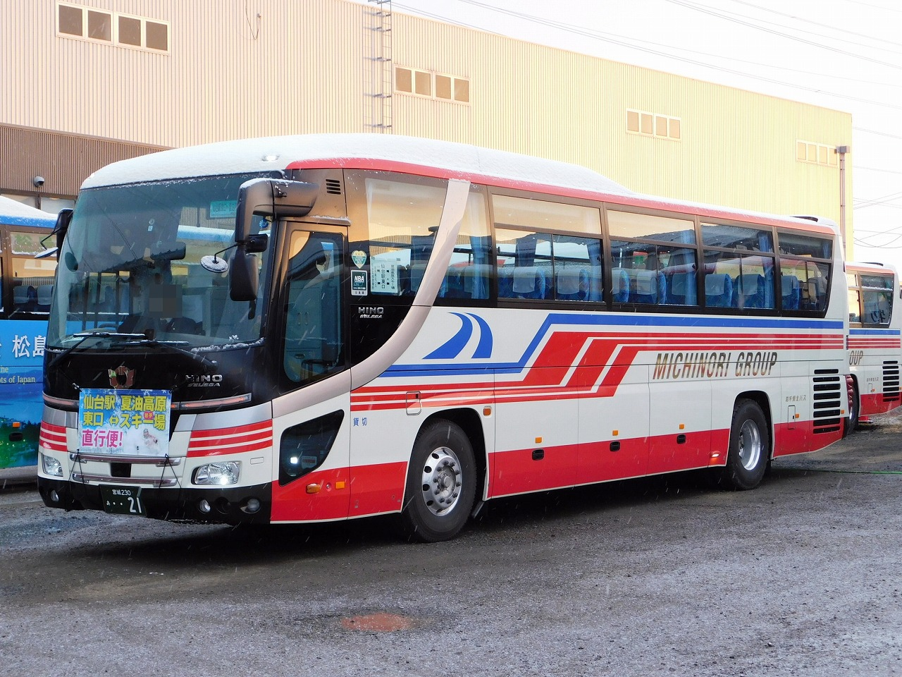 岩手県北自動車 日野・セレガ高速バス「仙台 - 夏油高原スキー場線」で運用中